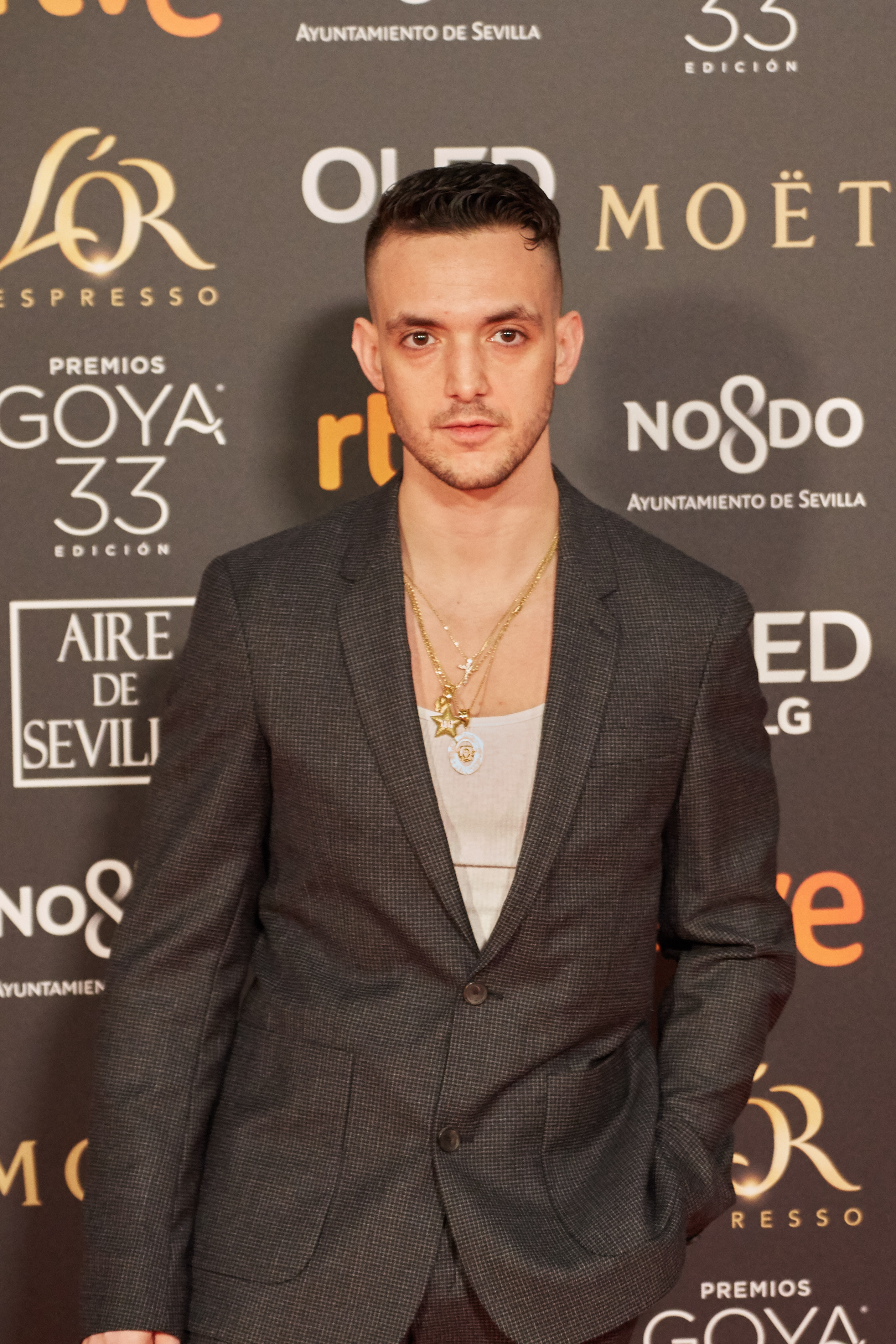 C Tangana en la alfombra roja de los Premios Goya celebrados en Sevilla en Febrero 2019